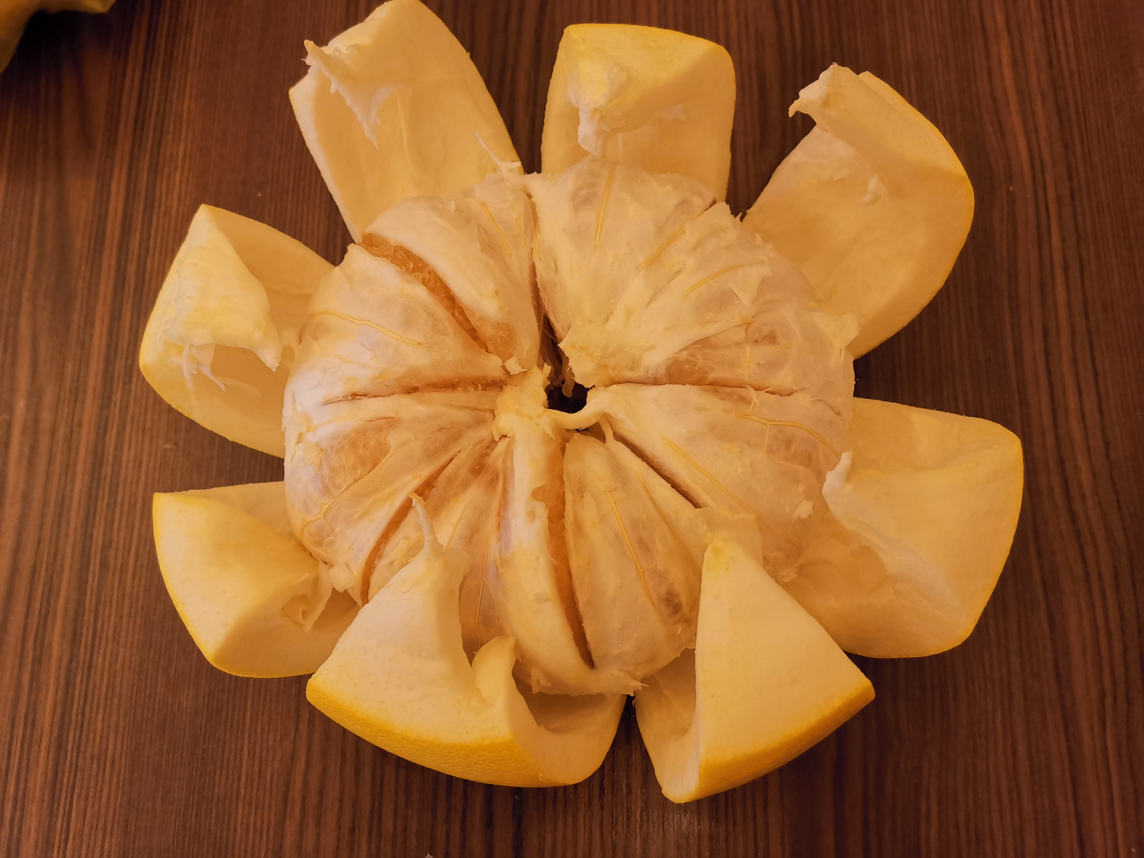 浙江台州玉环文旦剖面图